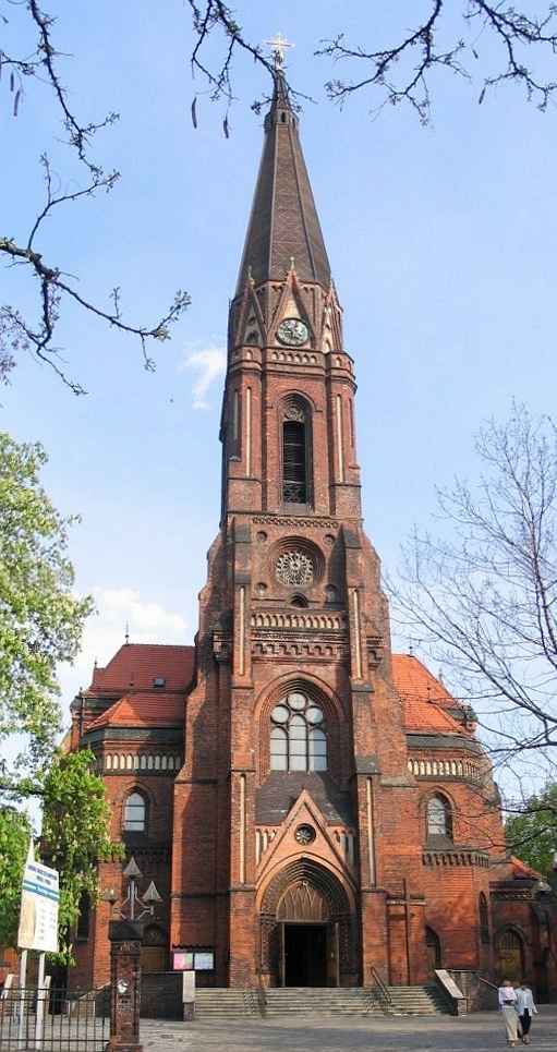 Kościół Piotra i Pawła w Katowicach (zabytek nr rejestr. A/1483/92)